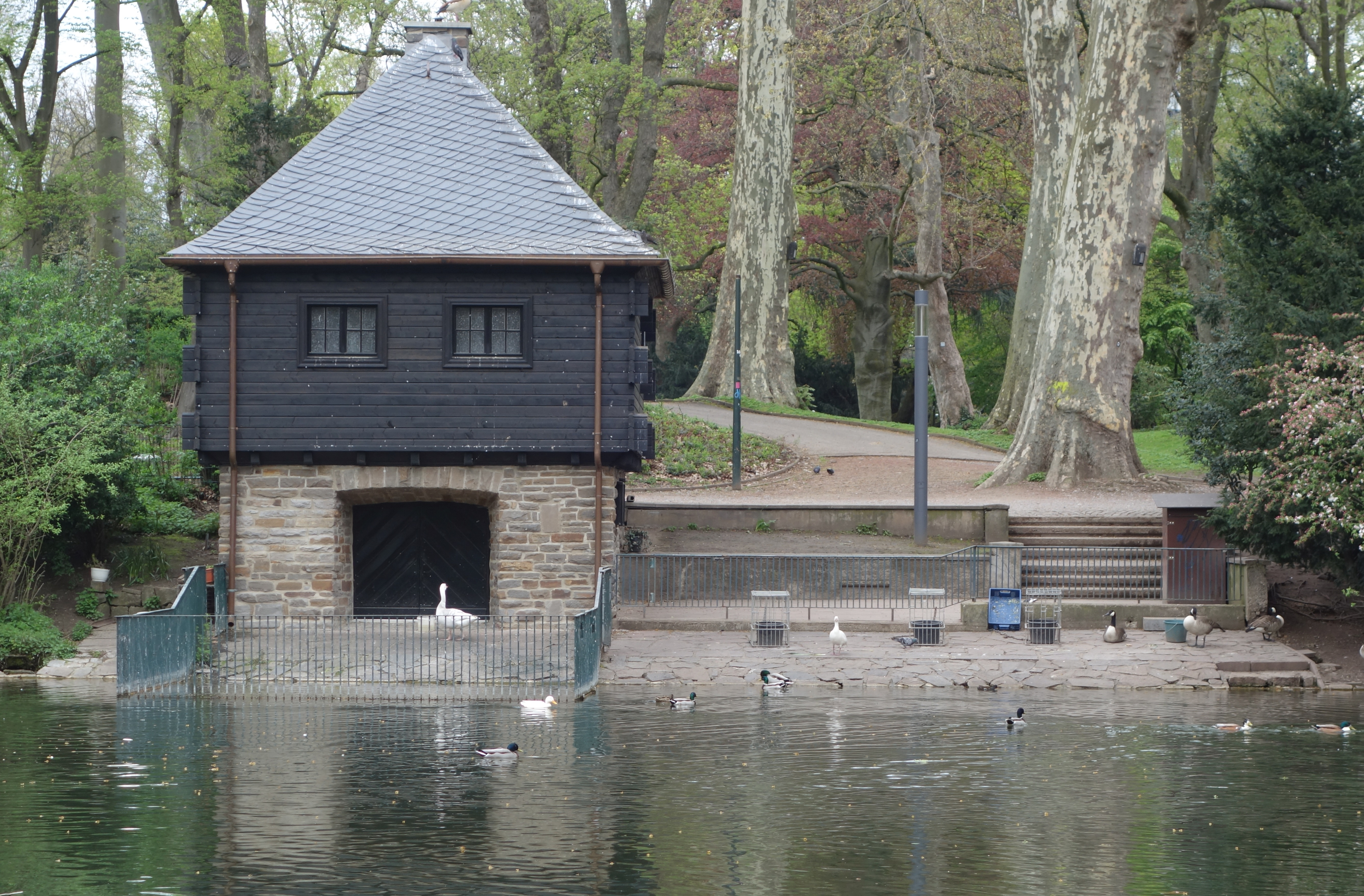 Das sogenannte Schwanenhaus im Düsseldorfer Hofgarten, April 2018.